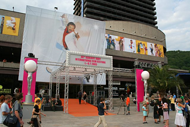 Vstup do hotelu Themal s výzdobou pro 40. MFF KV